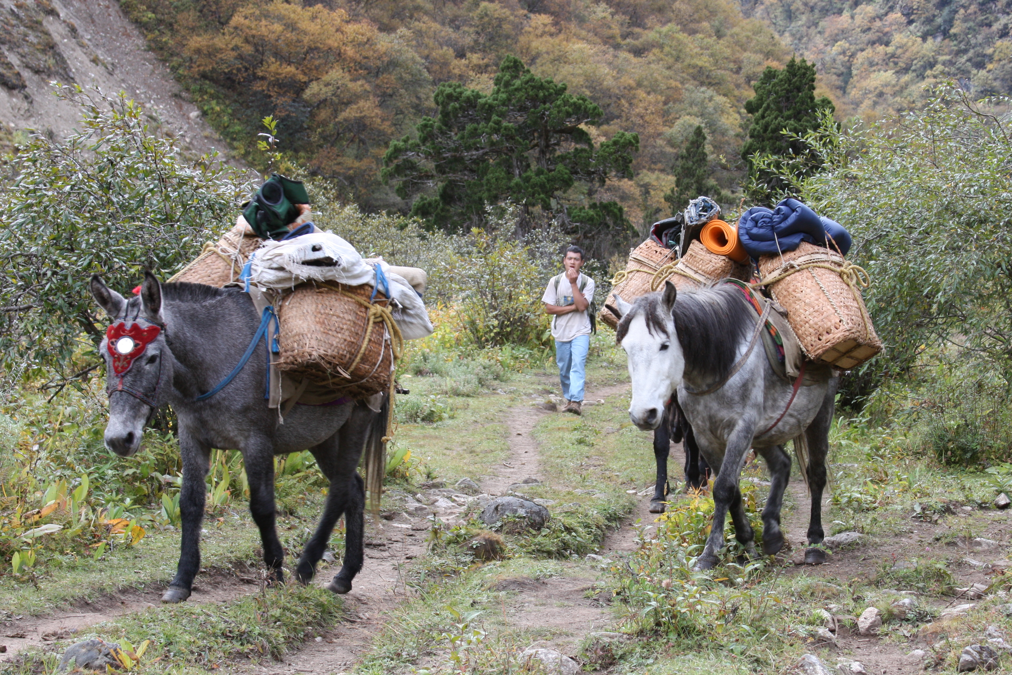 Saumpferde im Bhutan